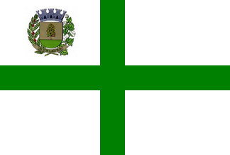 Bandeira de Rubiácea - SP - Brasil.